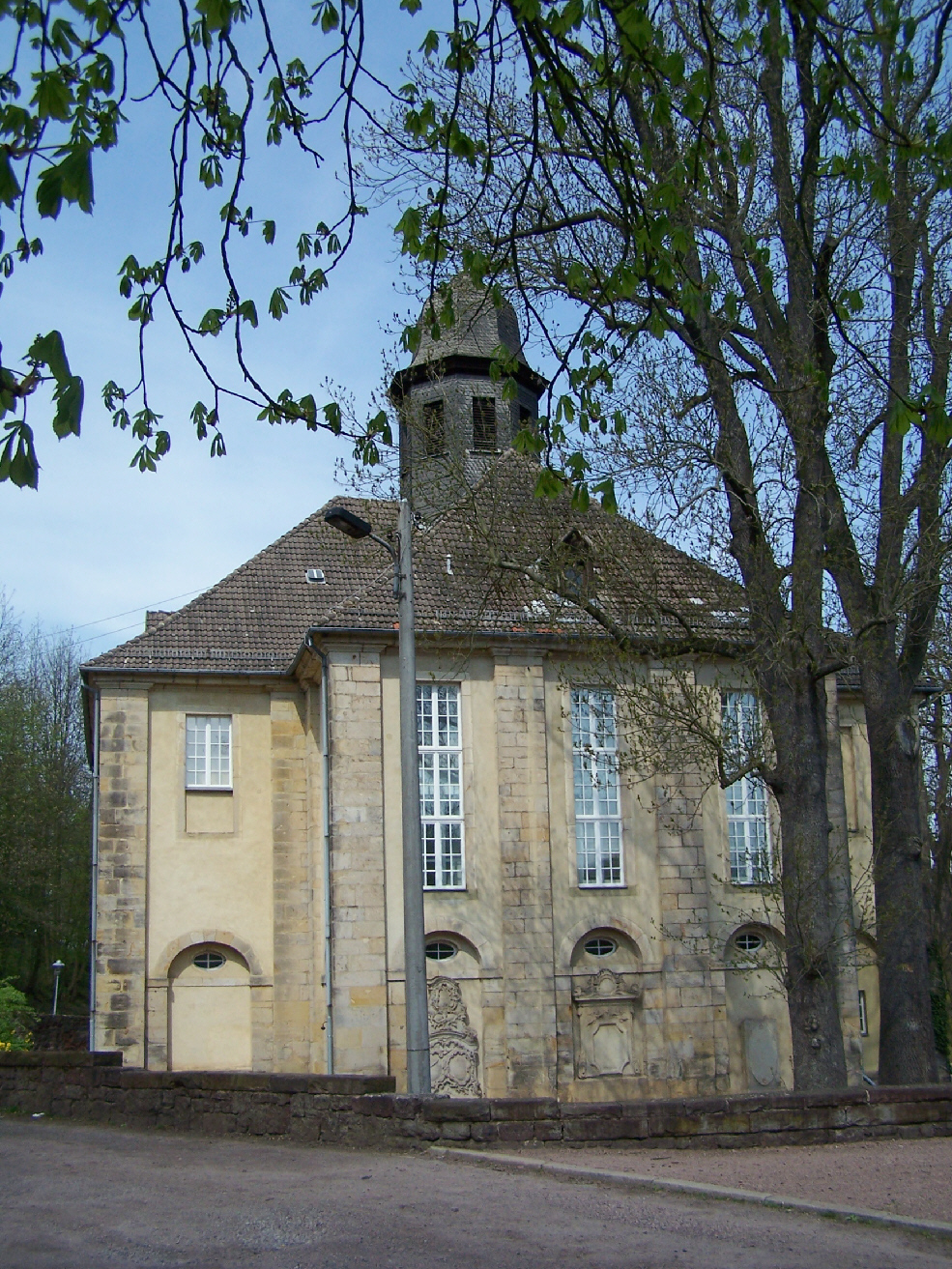 Kreuzkirche